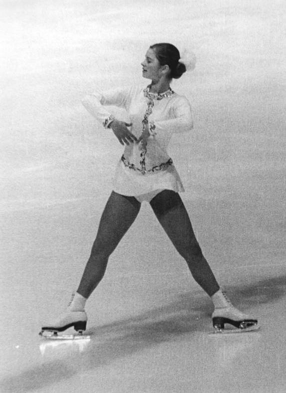 Christine Errath ADN-ZB Mittelstädt 3.10.1972 Berlin: Vorschaumotiv zu den Schaulaufveranstaltungen.- Einen Monat vor dem ersten internationalen Wettkampf der Saison 1972-1973 geben die besten DDR-Eiskunstläufer zusammen mit einigen namhaften Gästen auf vier Schaulaufveranstaltungen einen Einblick in ihren derzeitigen Vorbereitungsstand. Die willkommene Formüberprüfung nutzt auch die 15jährige Christine Errath (SC Dynamo Berlin - Foto von einem früherem Wettkampf). Schaulauf-Termine: am 5. und 6.10.1972 in Dresden, am 7.10. in Halle und am 8.10. in Berlin.